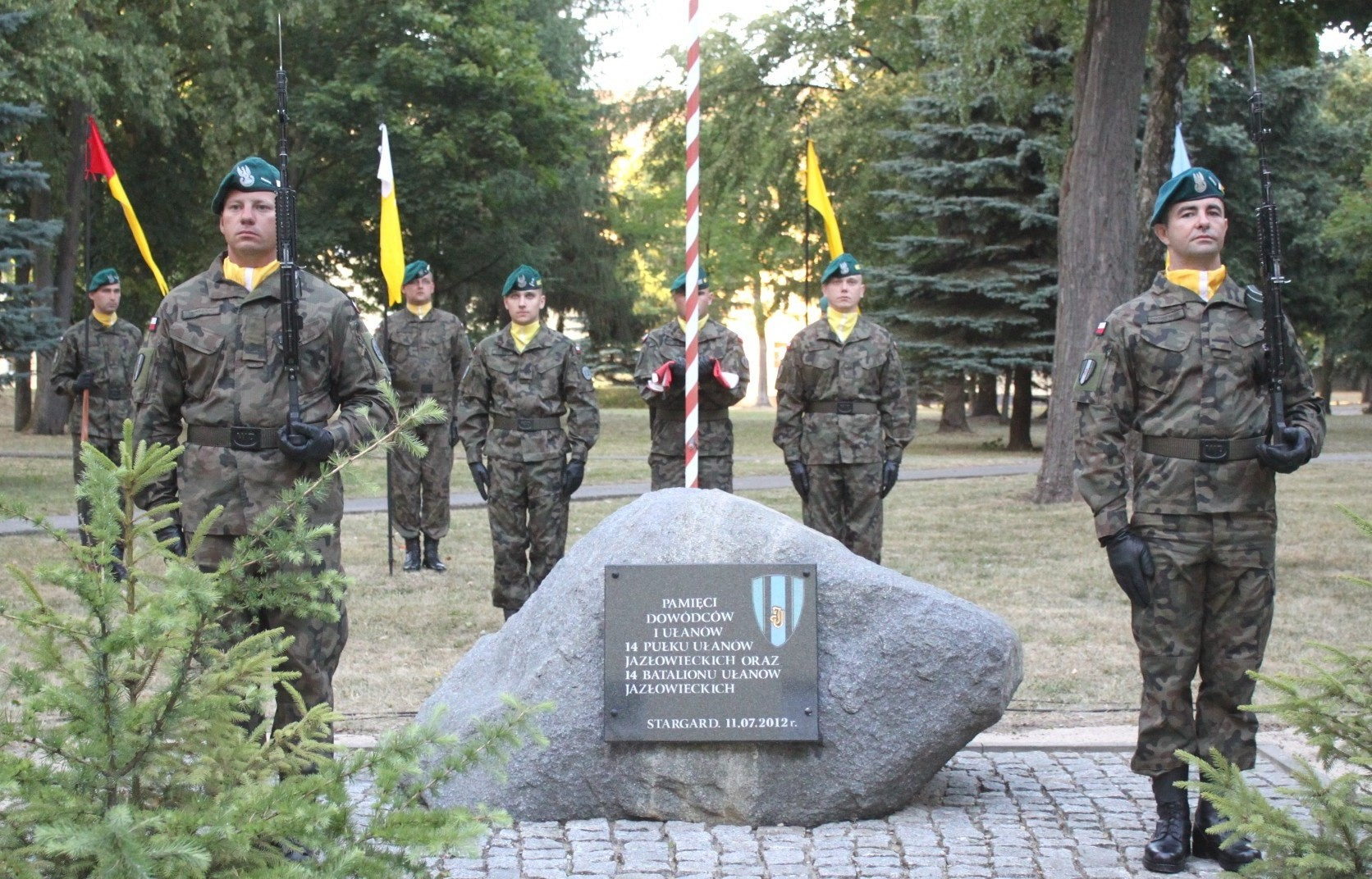 Tablica pamięci dowódców i 14 pułku Ułanów Jazłowieckich